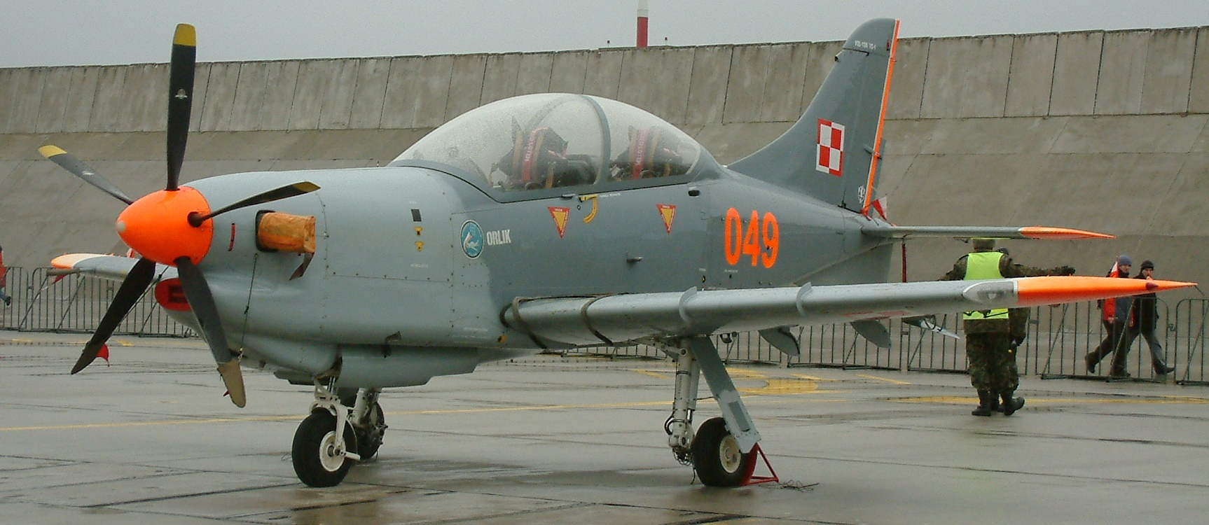 PZL-130TC-1 Orlik #049 of Polish Air Force, 31st. Air Base Poznań-Krzesiny